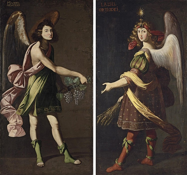 Atribuido a Francisco Polanco, Ángeles eucarísticos, colección particular. Los tipos angélicos repiten dos de los arcángeles de la catedral de Jaén, alguna vez atribuidos a Polanco, sin más cambio que el de los atributos e inscripciones, en este caso un racimo de uvas y unas espigas de trigo con evidente significación eucarística.